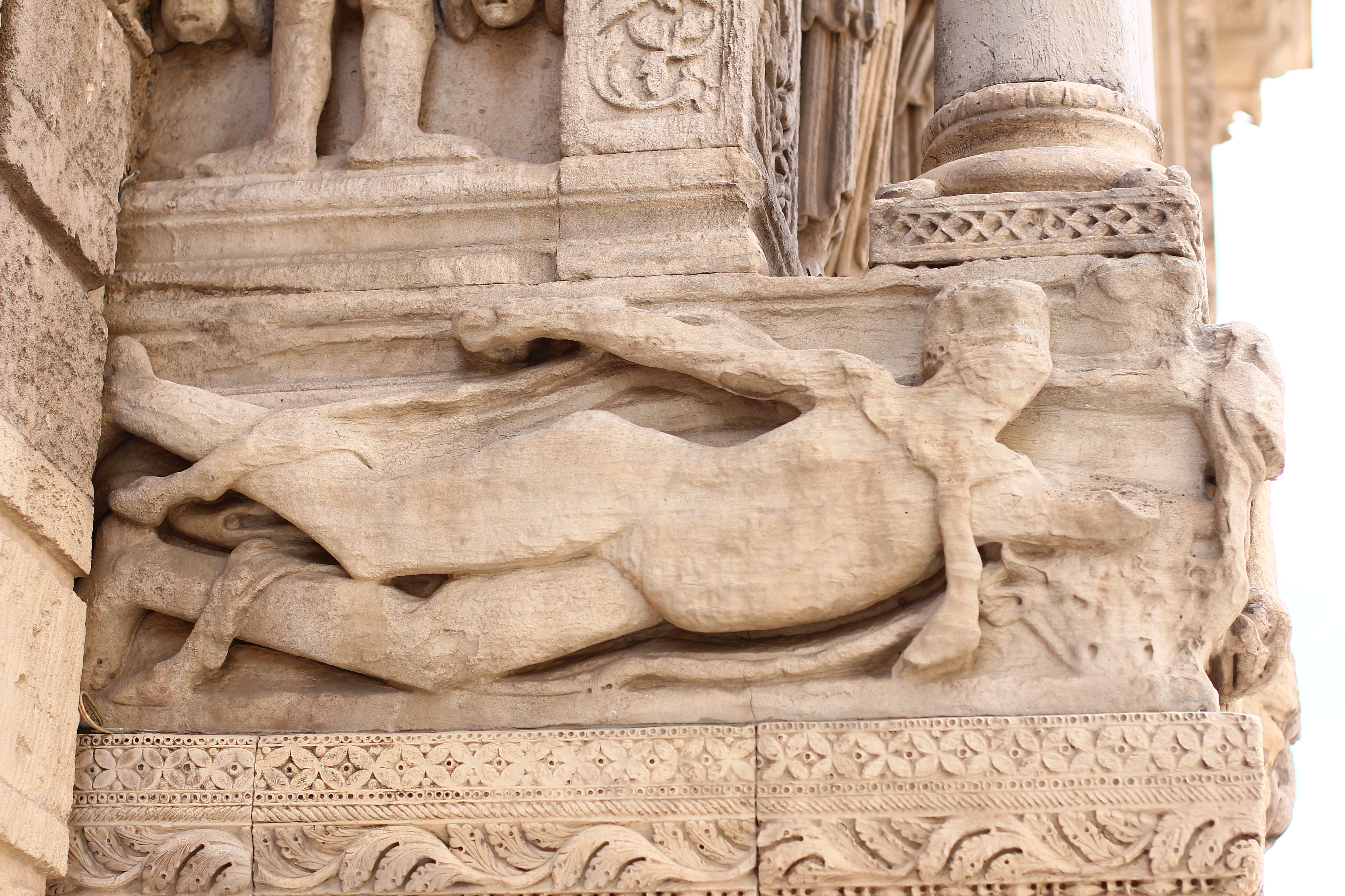 "Пловец"